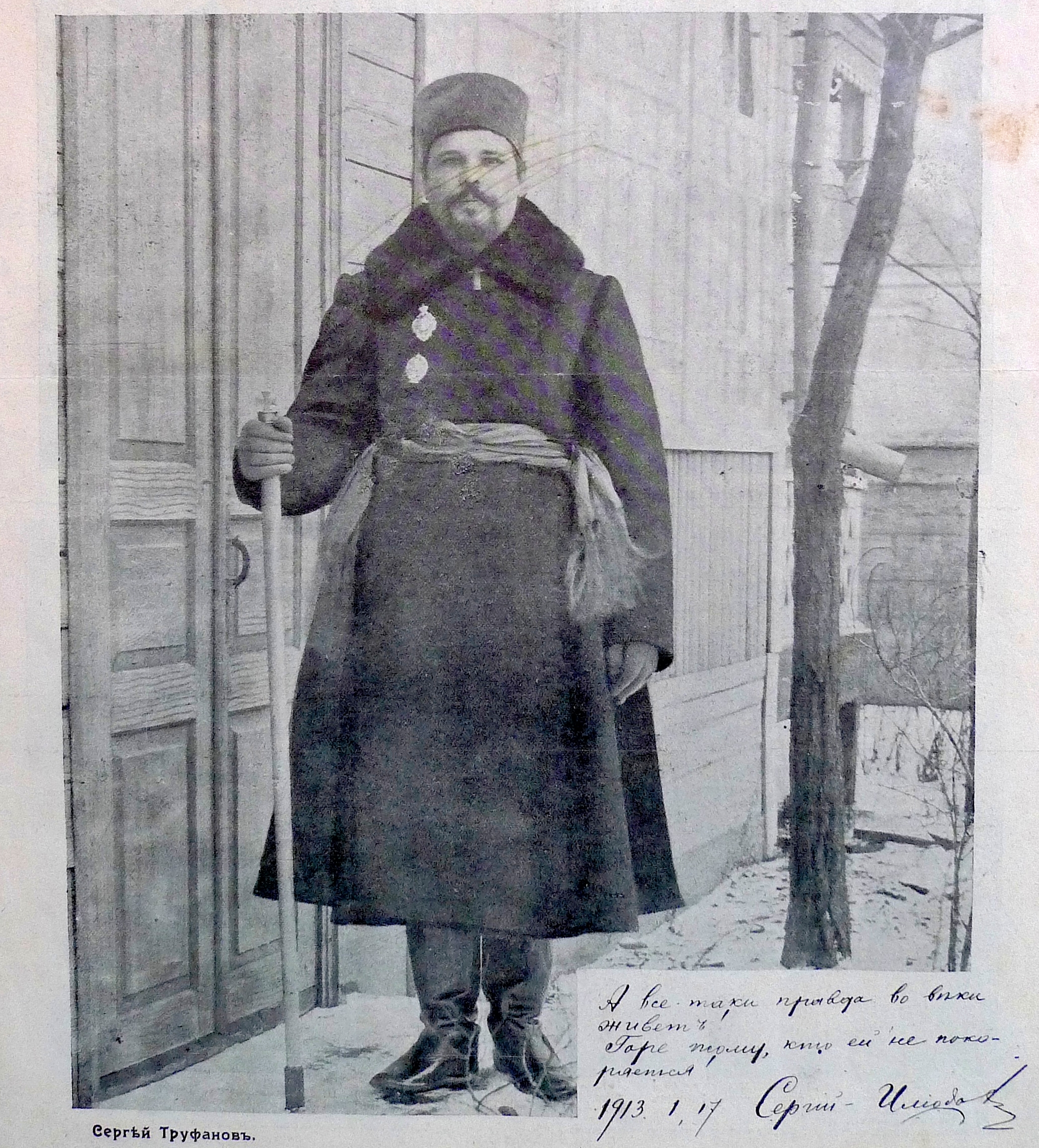 Бывший иеромонах Илиодор Труфанов в Мариинской станице, Донской области